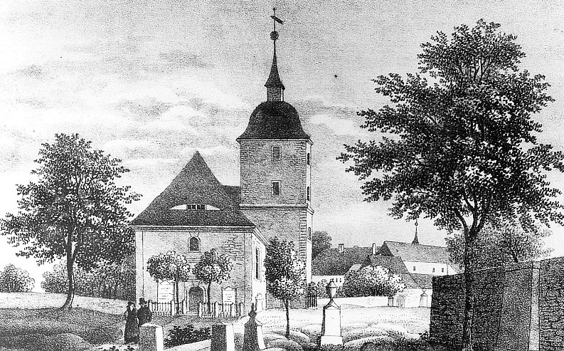 Original image description from the Deutsche Fotothek Triebischtal-Miltitz. Kirche